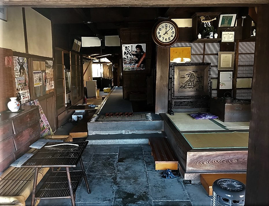 大屋旅館（おおやりょかん）は、千葉県夷隅郡大多喜町新丁64にある旅館。江戸時代より続く老舗旅館で、正岡子規やつげ義春ゆかりの宿として知られる。国登録有形文化財に登録されている。撮影：谷 敏行